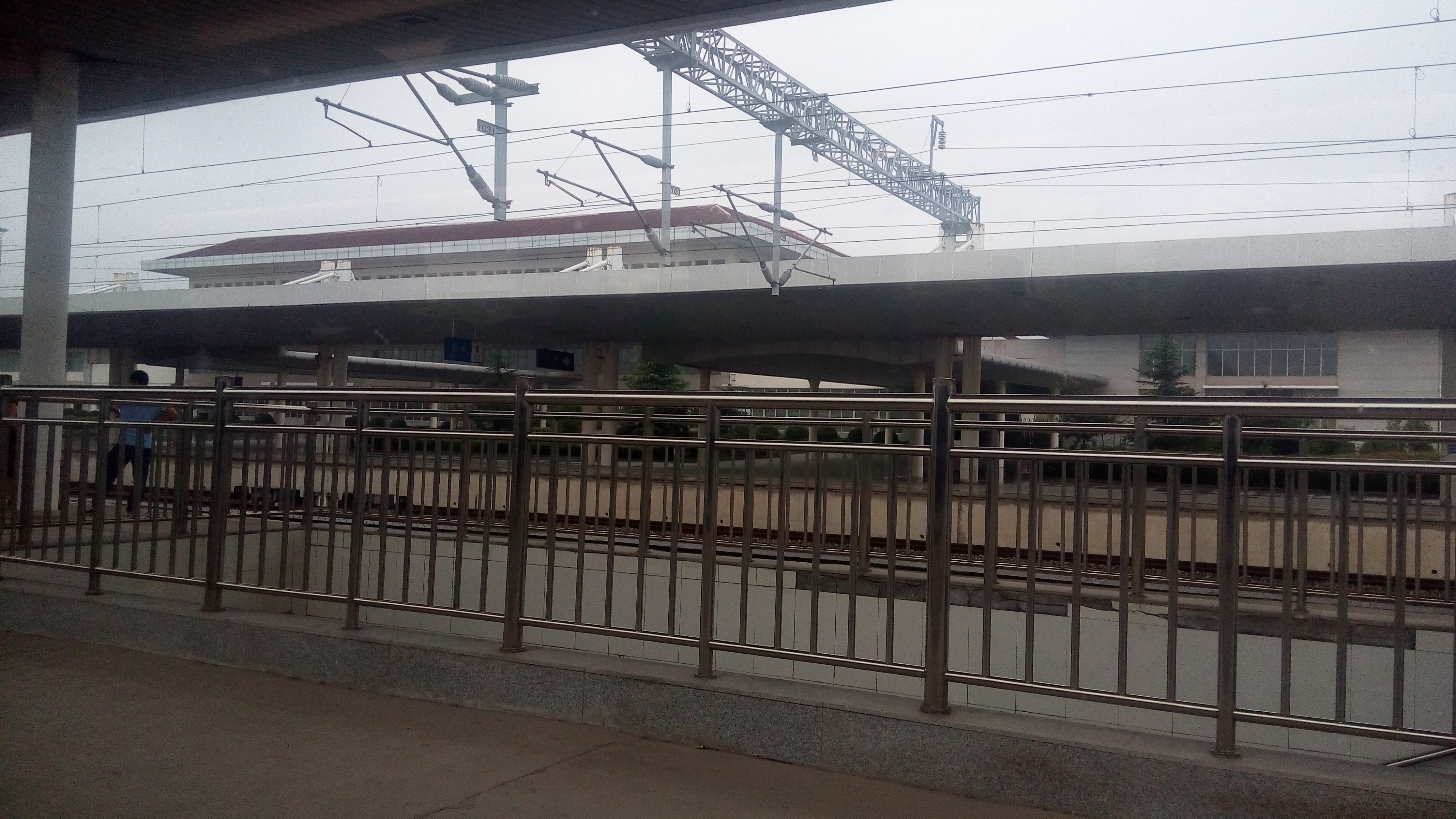 停靠在全椒站岛式站台